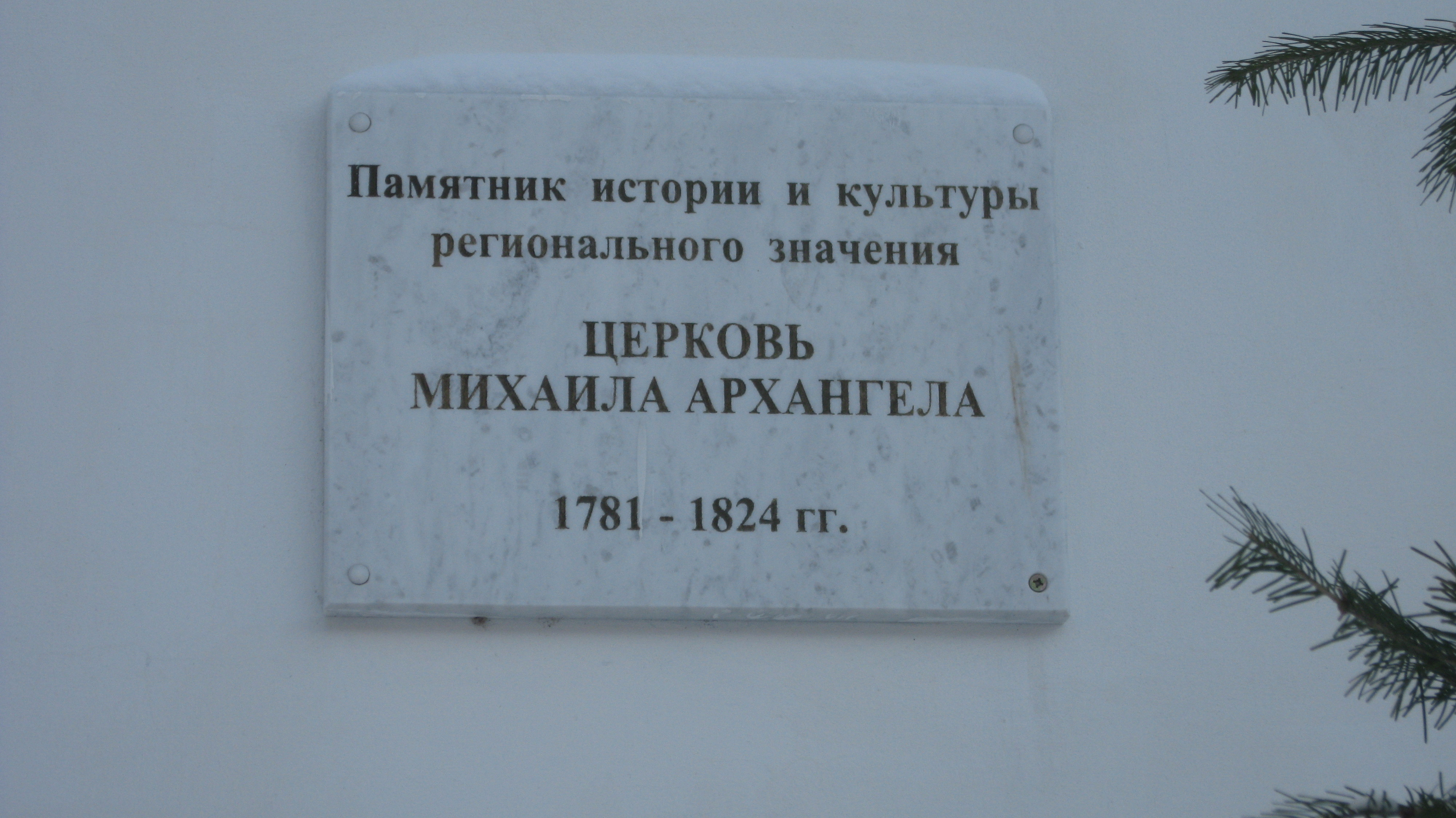 Охранная табличка на церкви Михаила Архангела в Тюмени.